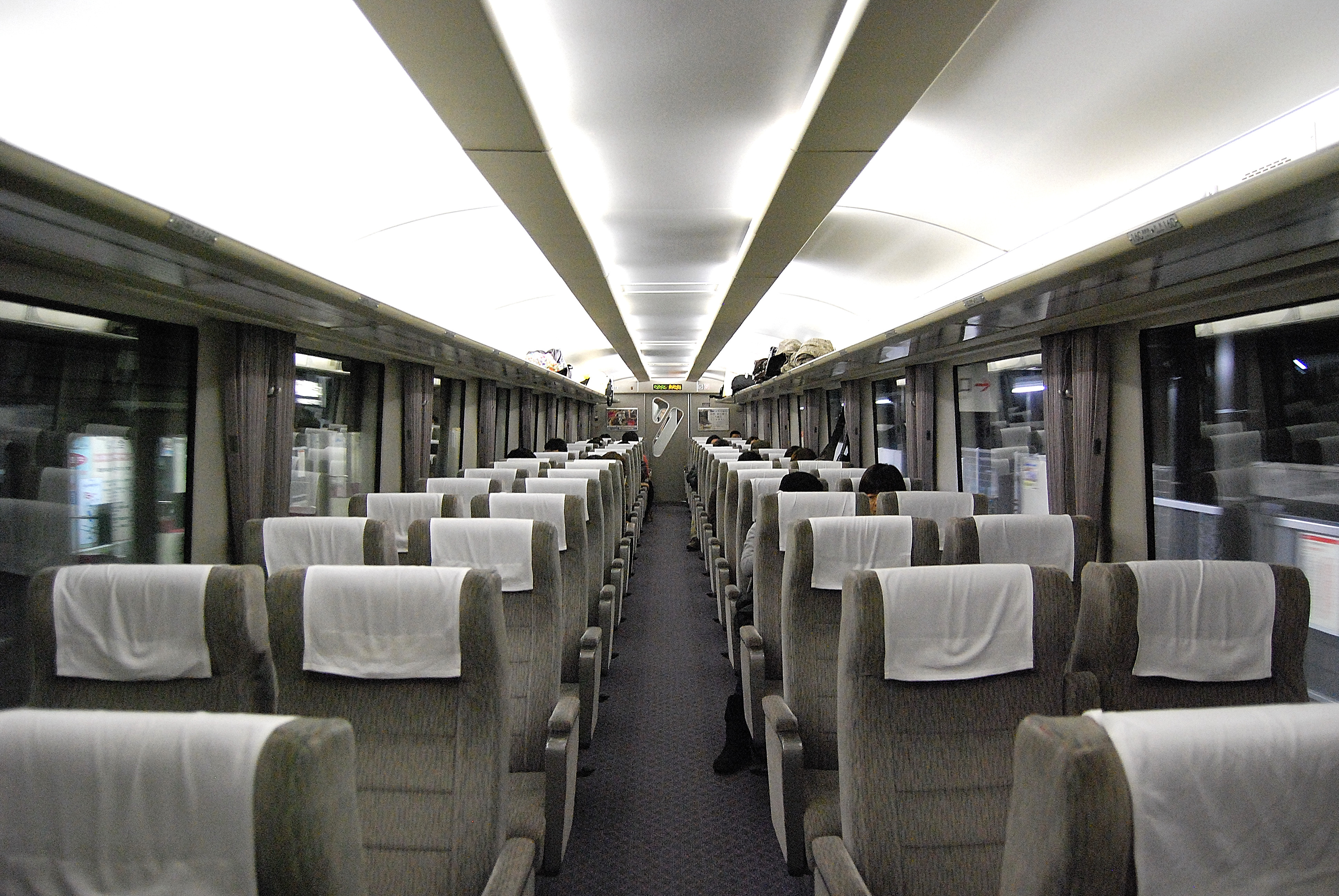 小田急20000系（RSE）の5号車の普通席。